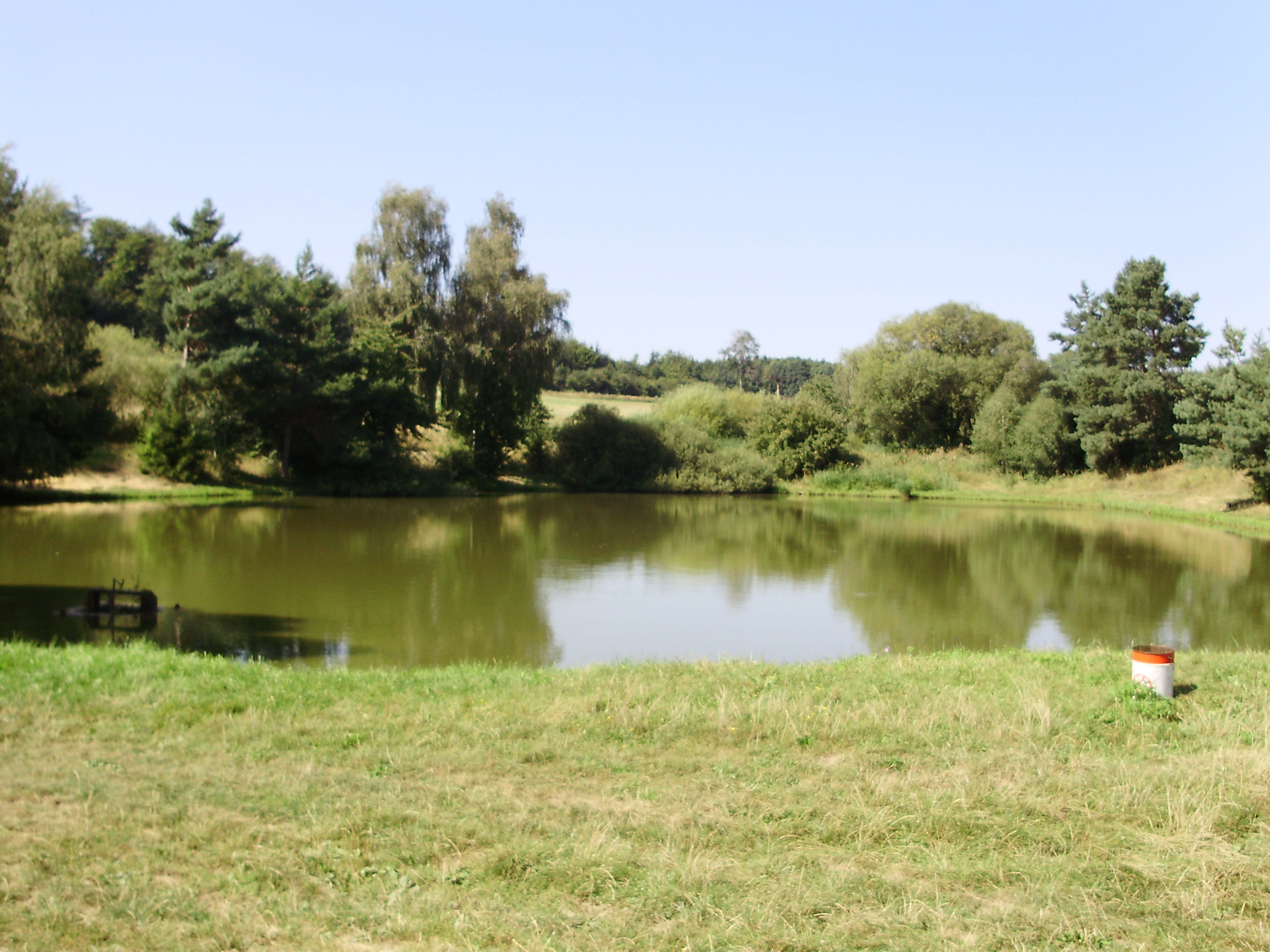 Ježkovice - rybník (Vyškov- Czech republic)